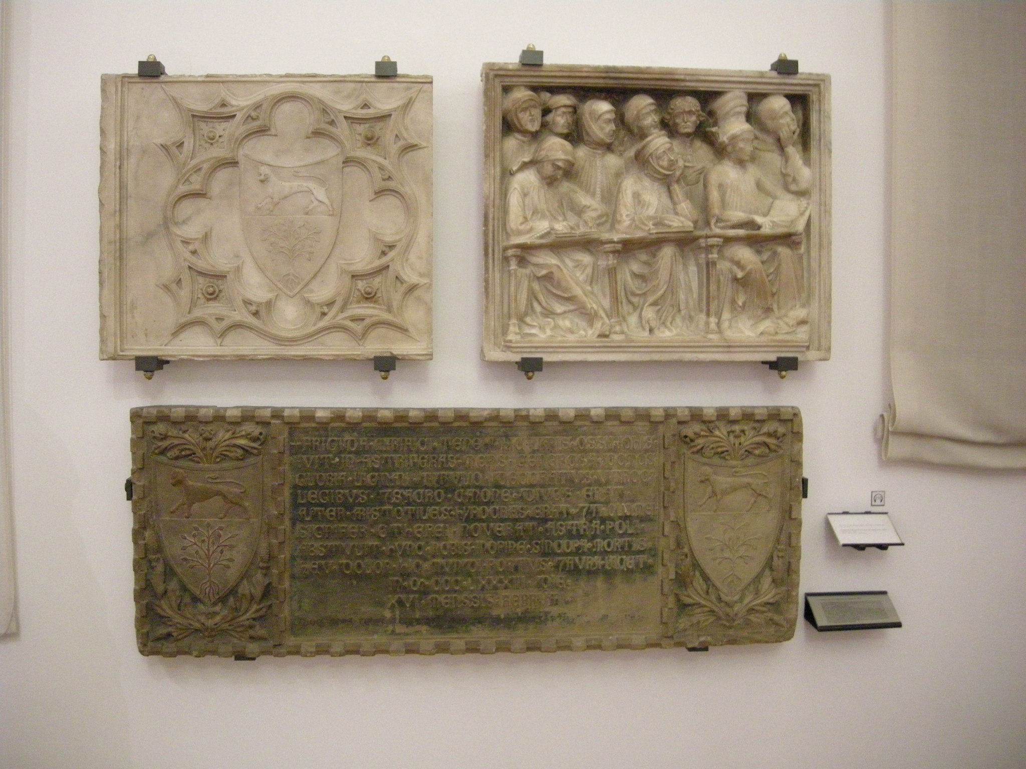 Pier Paolo delle Masegne e Jacobello da Bologna, Frammenti dell'arca di Giovanni da Legnano (morto nel 1383), esposta nel Museo civico medievale a Bologna.